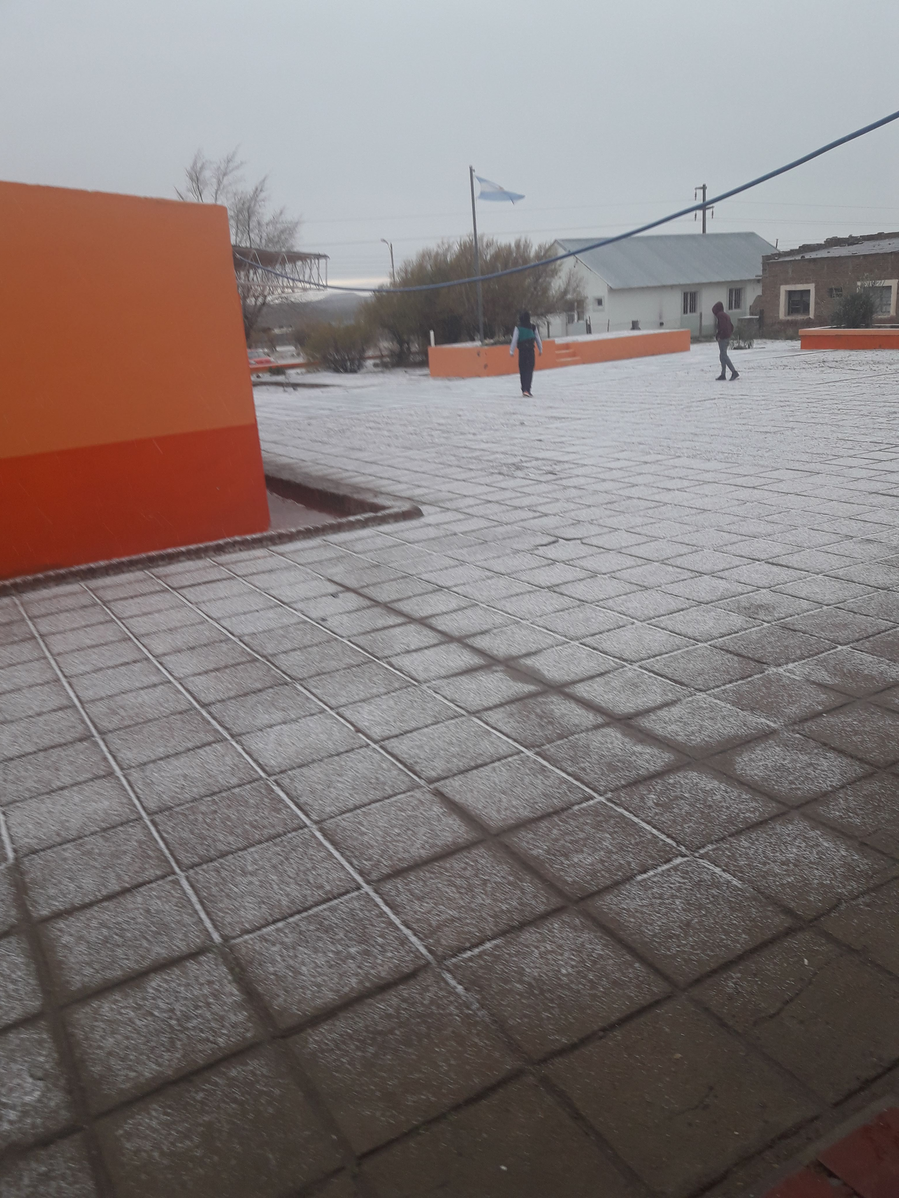 Nevada en el paraje Aguada Cecilio. Foto tomada desde el aula de la escuela secundaria del paraje.